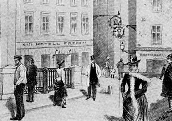 Österlånggatan med Källaren Remmen och Den gyldene Freden